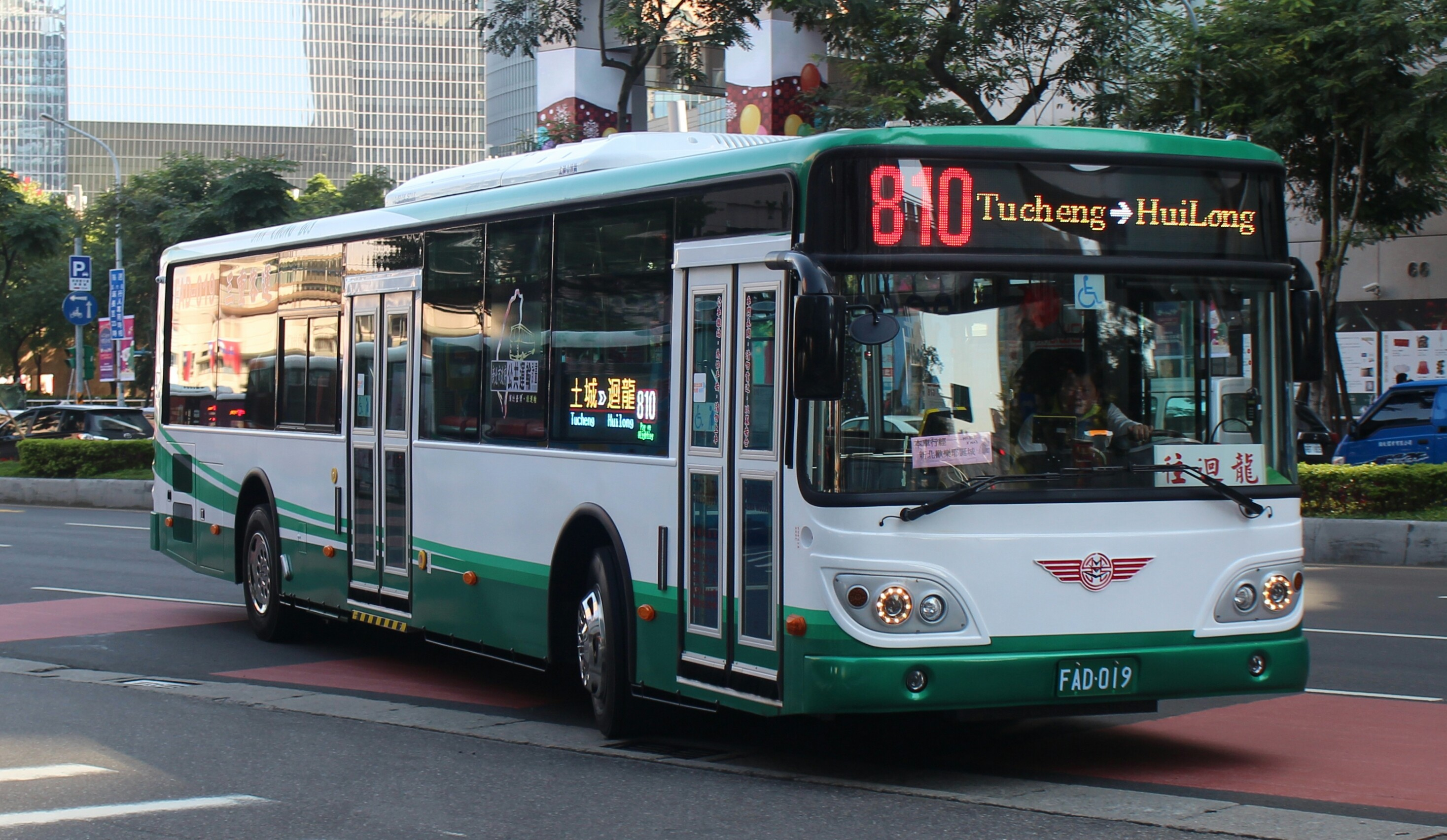 三重客運成運汽車MB120NS FAD-019 新北市區公車810線